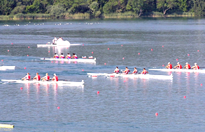 Foto de l'Estany de Banyoles